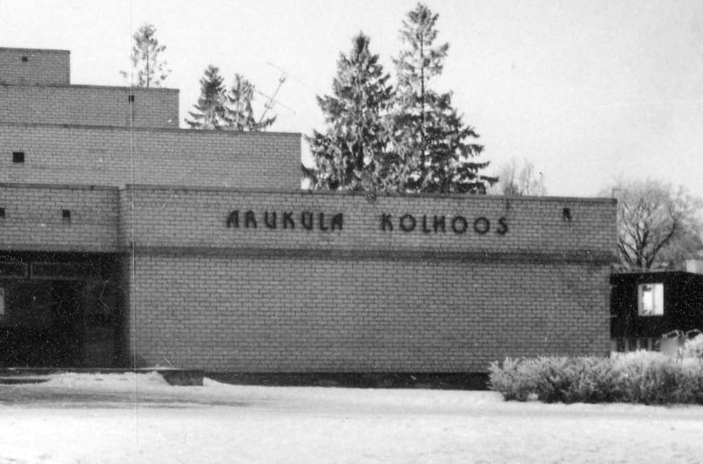 Aruküla kolhoosi keskusehoone